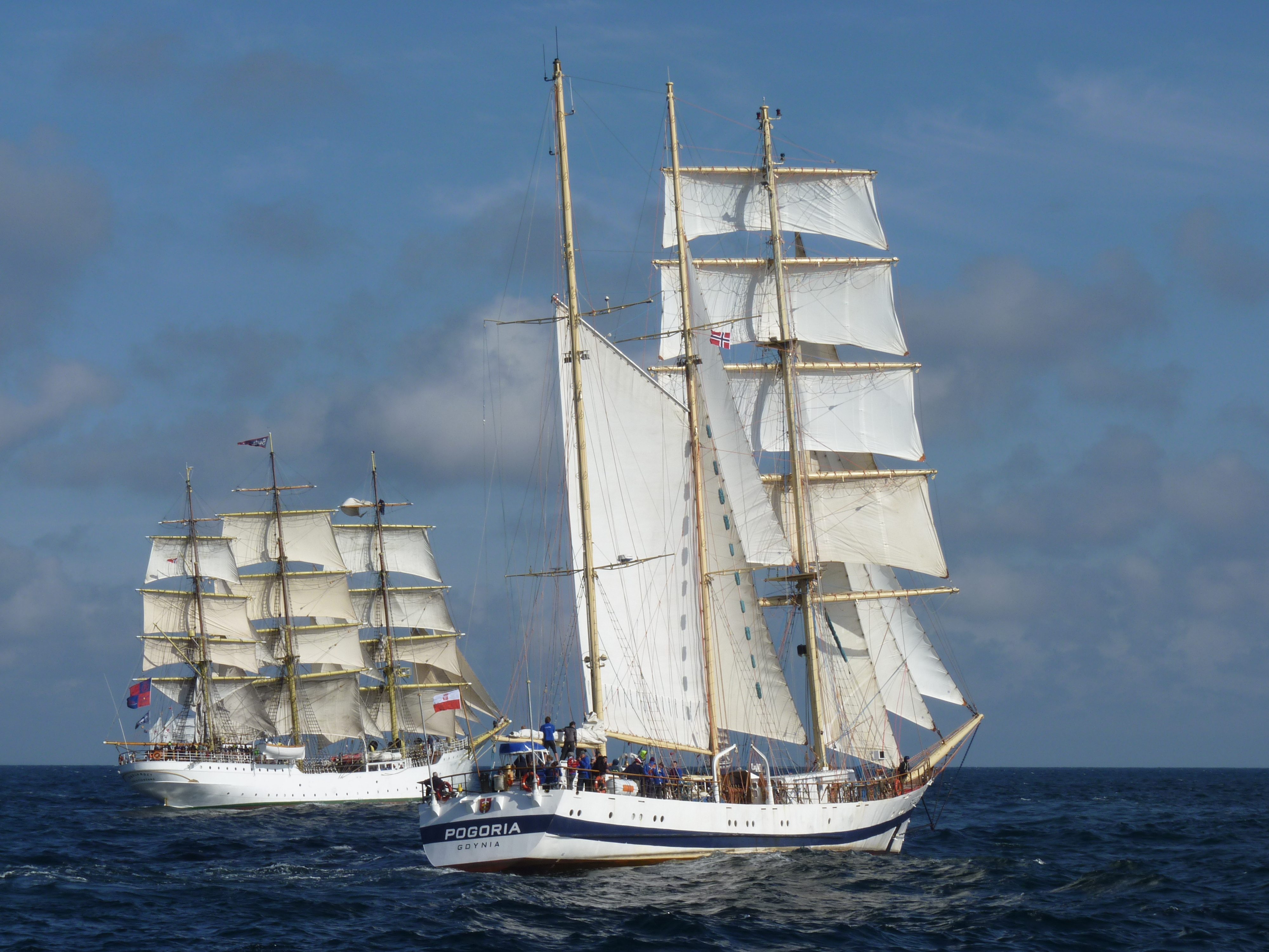 Start w regatach Kristiansand - Operacja Żagiel 2010 (The Tall Ships' Races 2010)